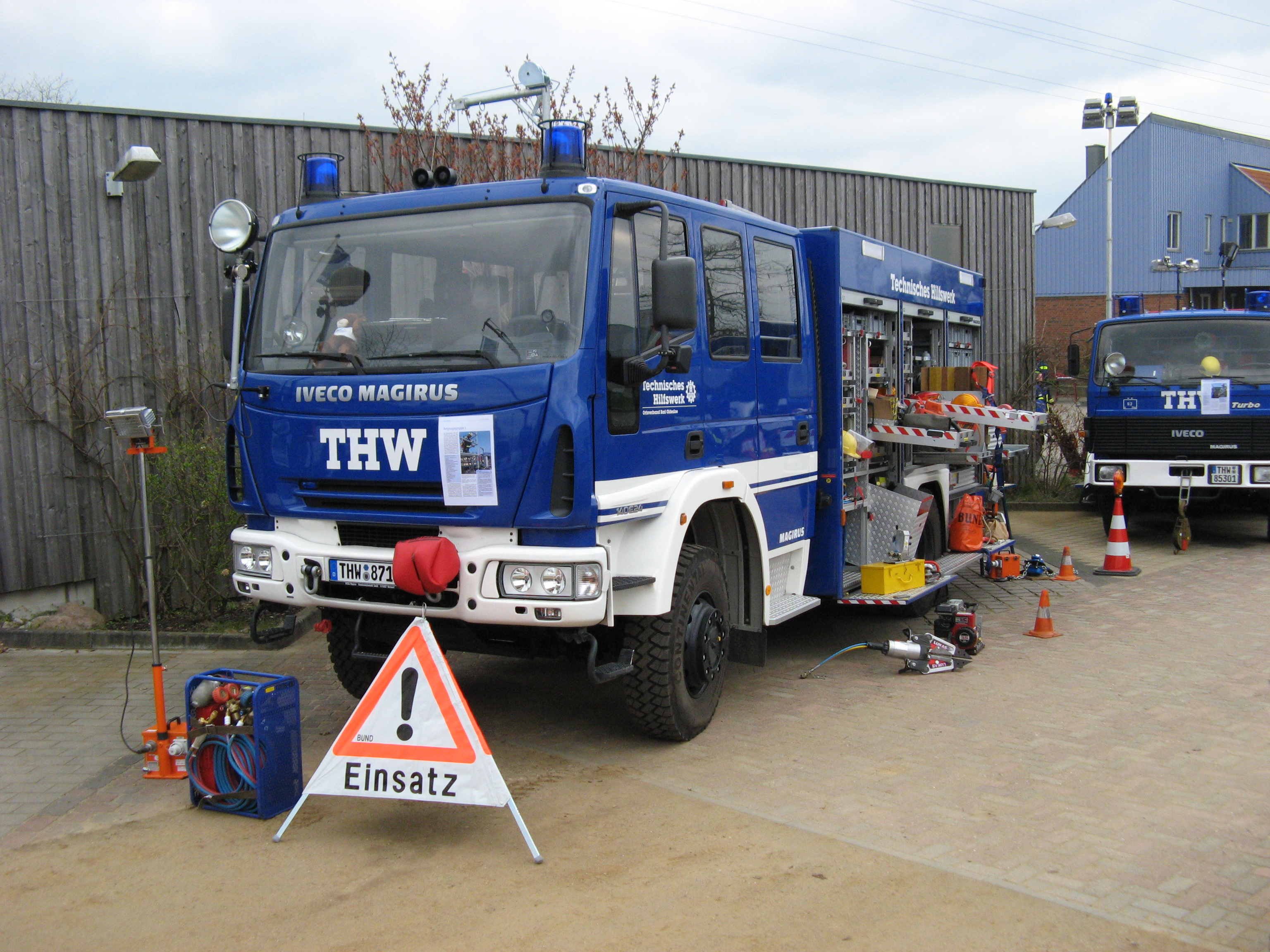 GKW des Ortsverbandes Bad Oldesloe.